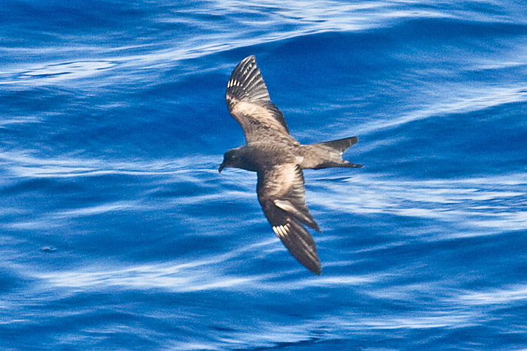 012016-IMG_5713 Matsudaira's Storm-Petrel (Oceanodroma matsudairae)